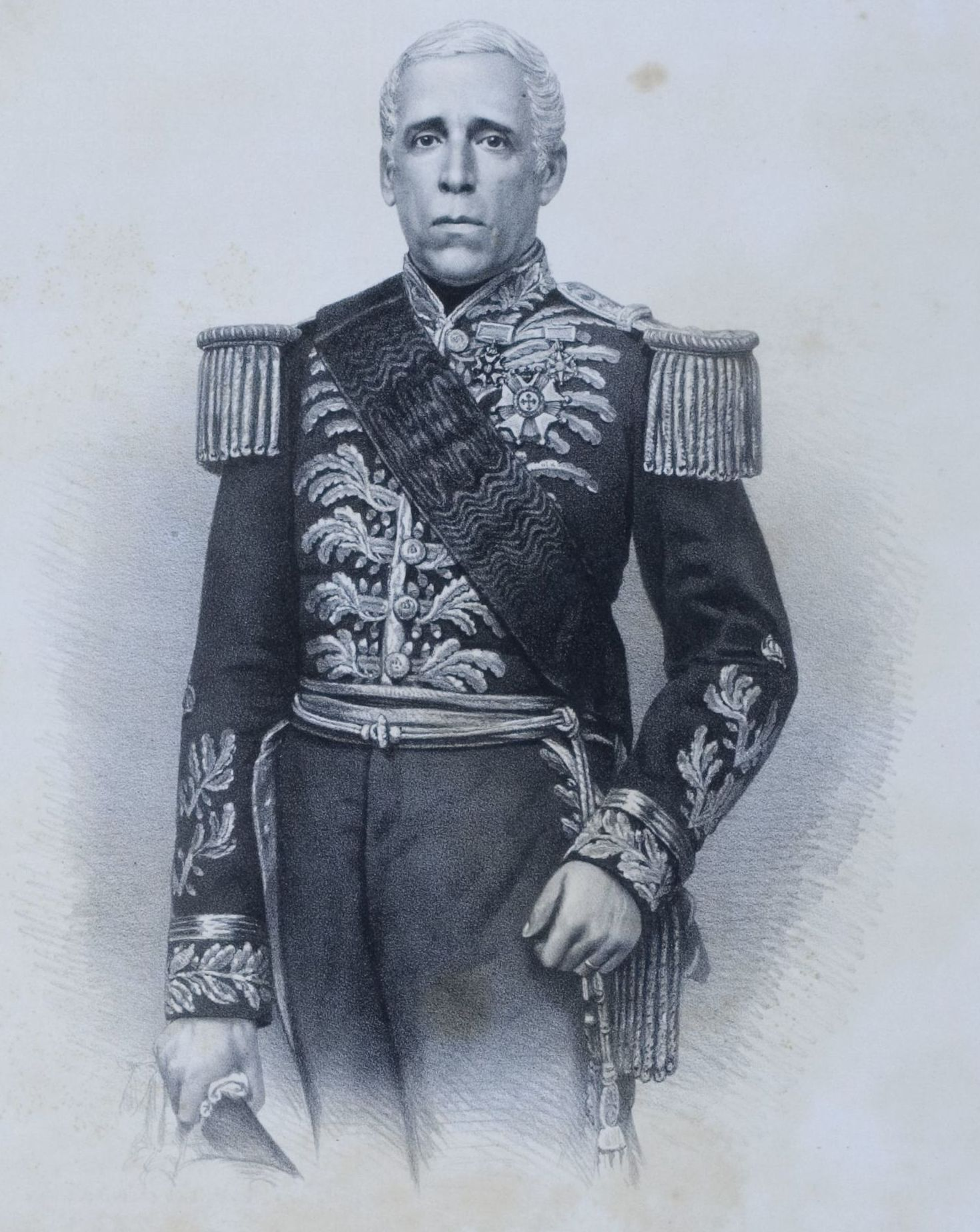 Litografia em preto e branco